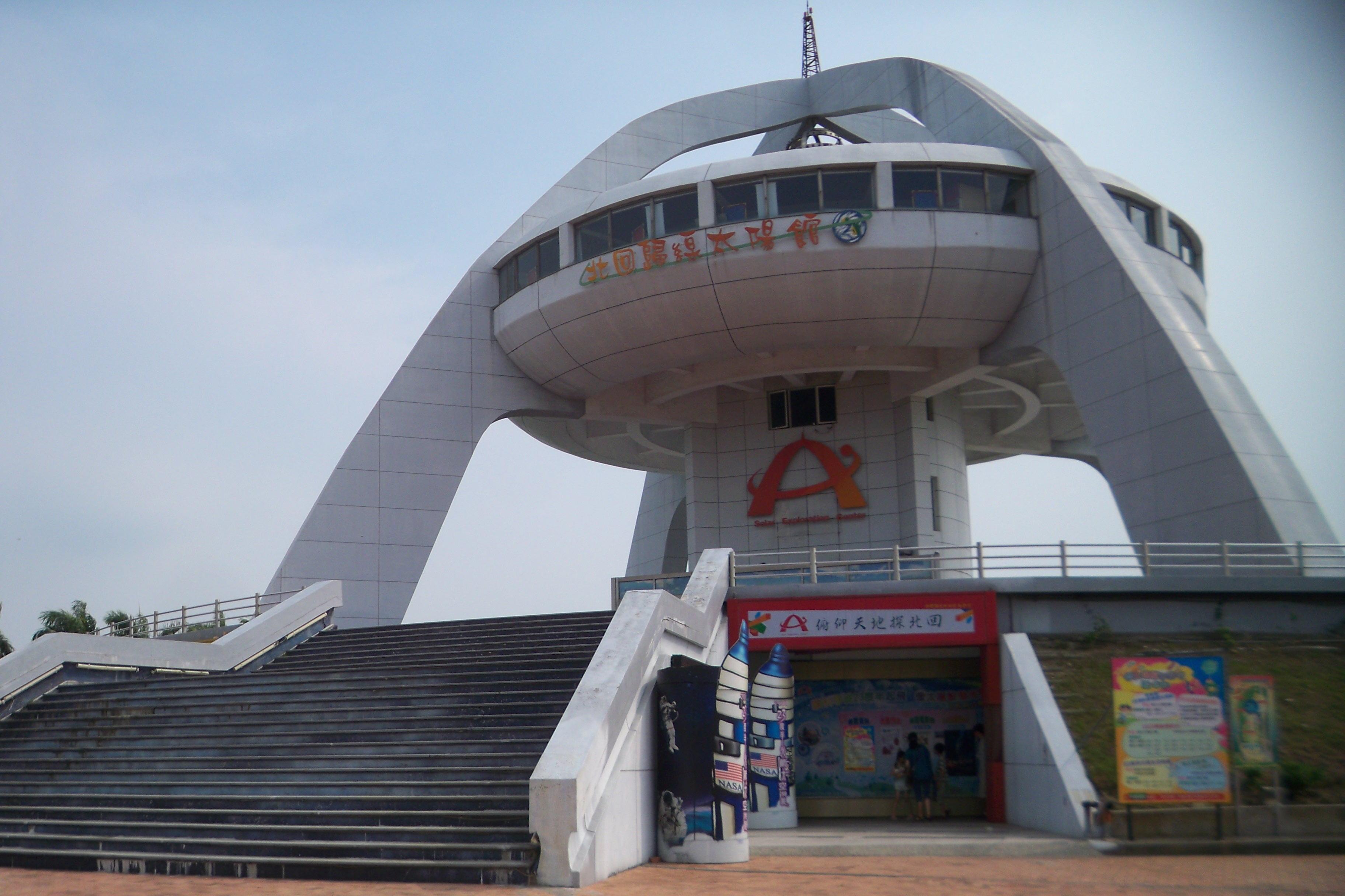 嘉義縣水上鄉 北回歸線太陽館